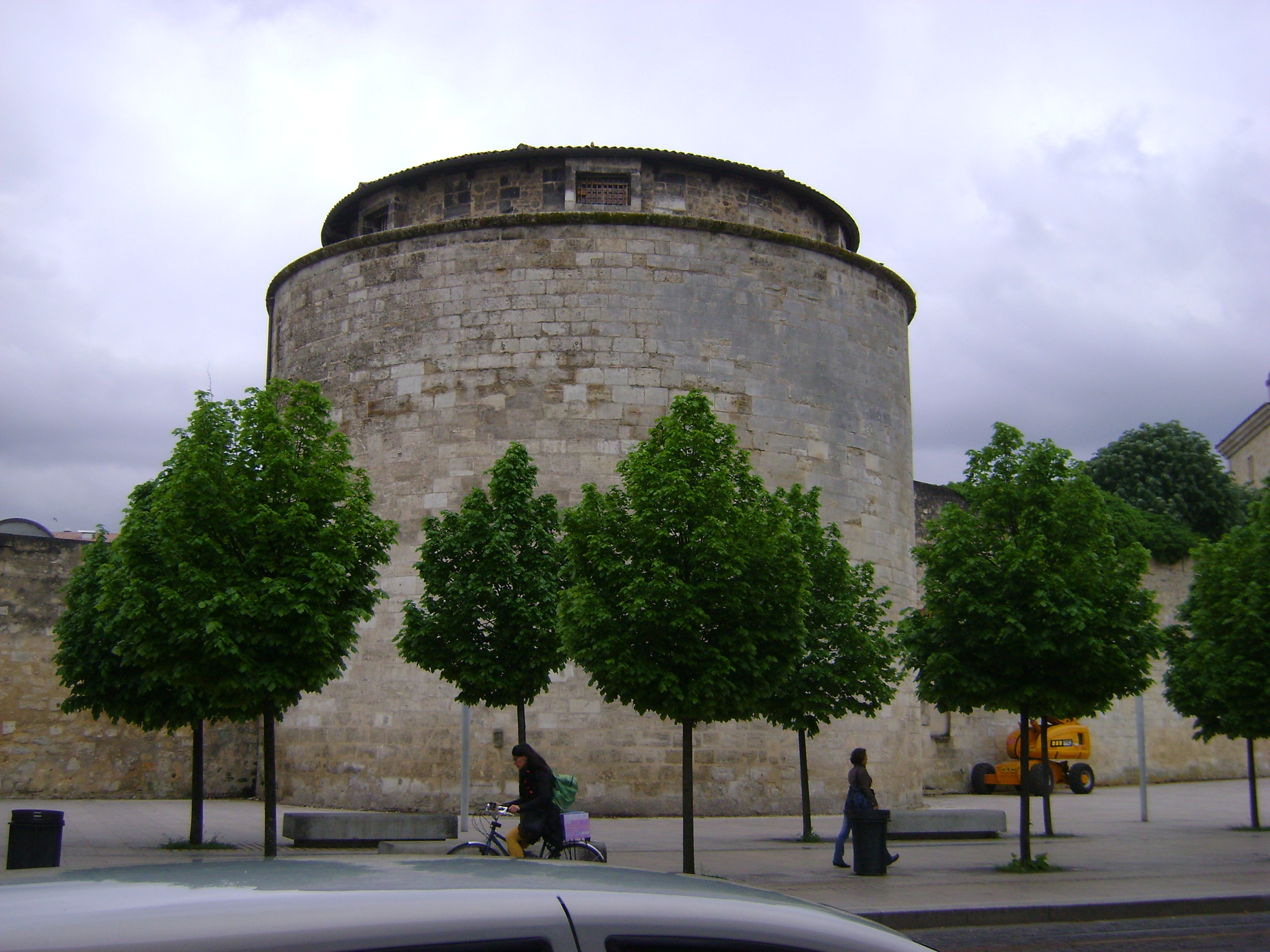 Le Fort du Hâ à Bordeaux. La Tour ronde. .